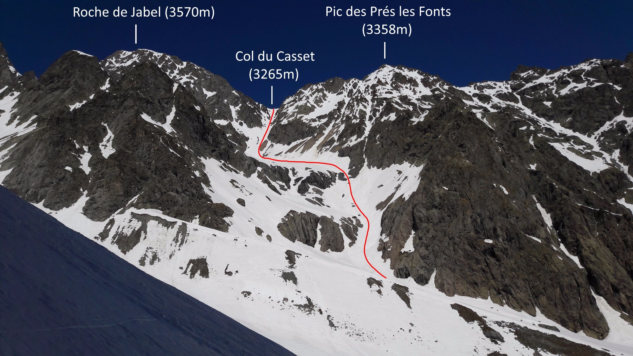 Le versant SE du Col du Casset à Monêtier-les-Bains.